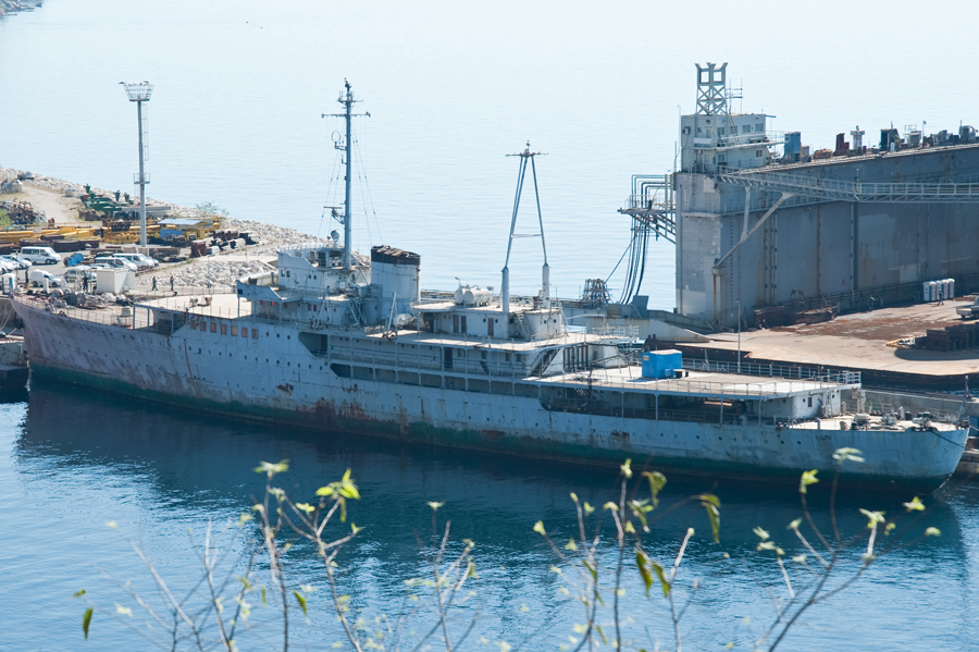 Galeb u Viktoru Lencu